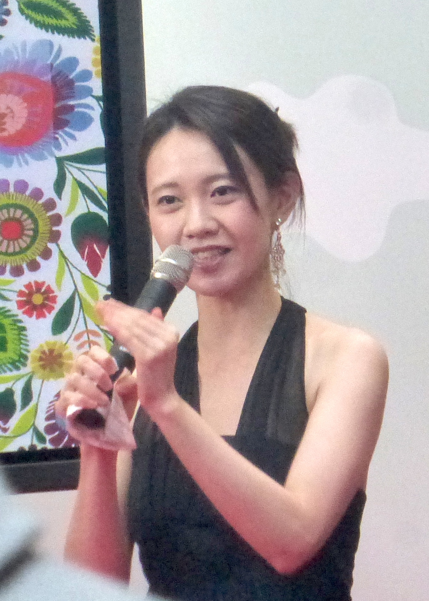 中園ヴェングォフスカ理沙、六本木のポーランド祭にて （Lisa Nakazono-Węgłowska）